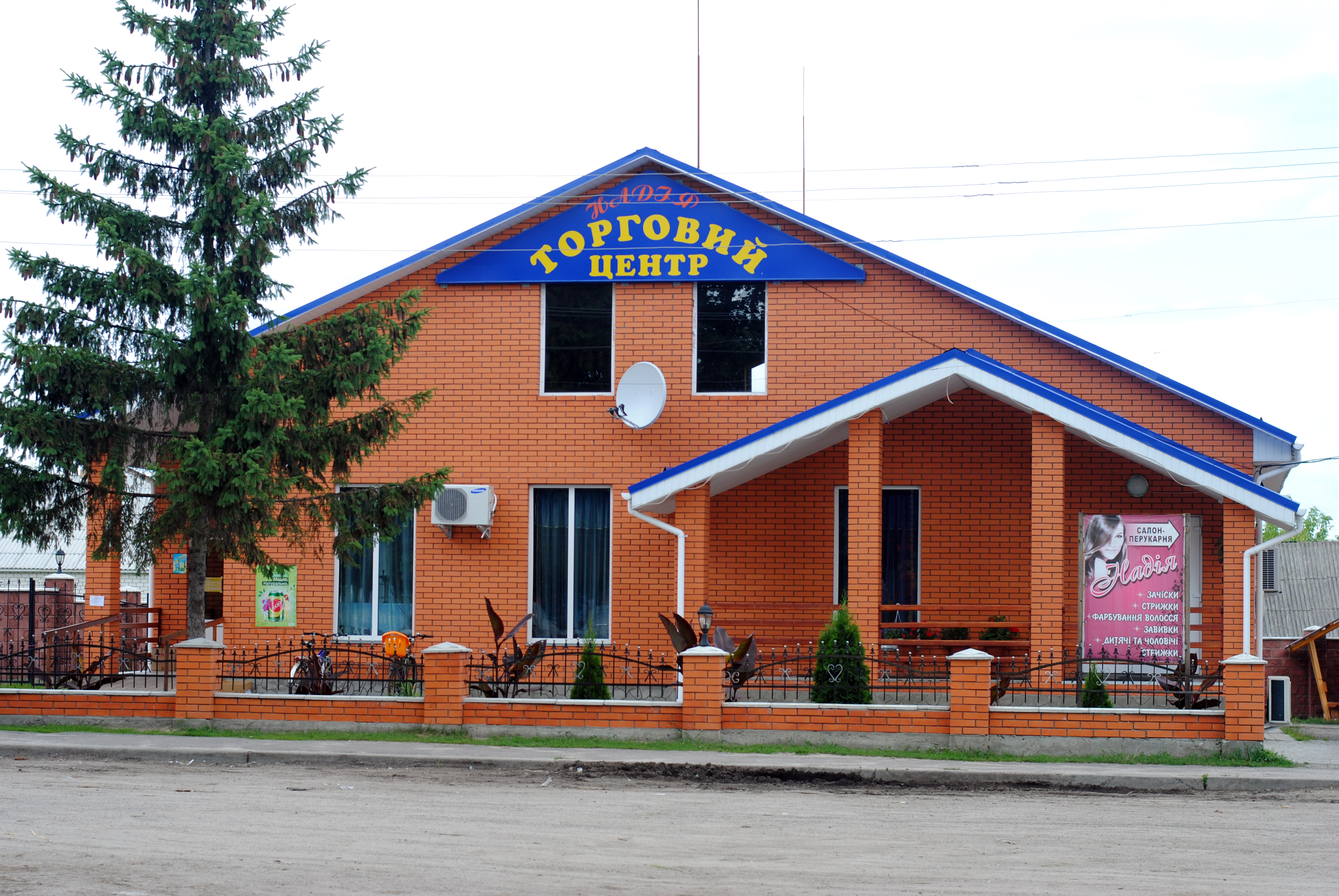 Торговий центр в с. Борове, Зарічненський район, Рівненська область